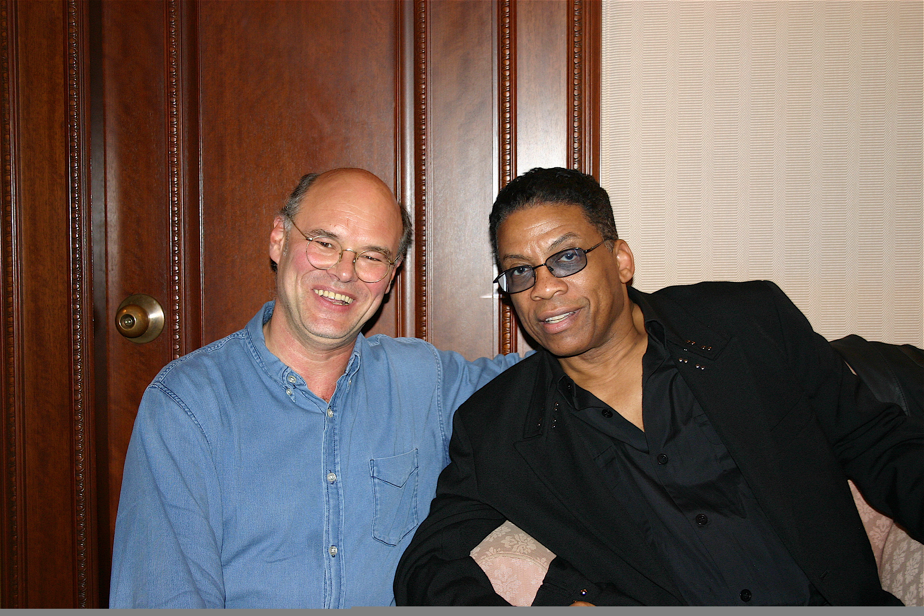 Christoph Spendel mit Herbie Hancock